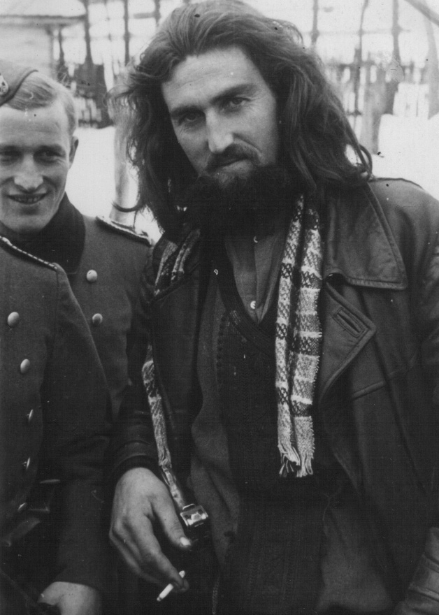 Srpskohrvatski / српскохрватски: Stevan Leko Damjanović, komandant Majevičkog četničkog korpusa, sa pripadnikom SS divizije.